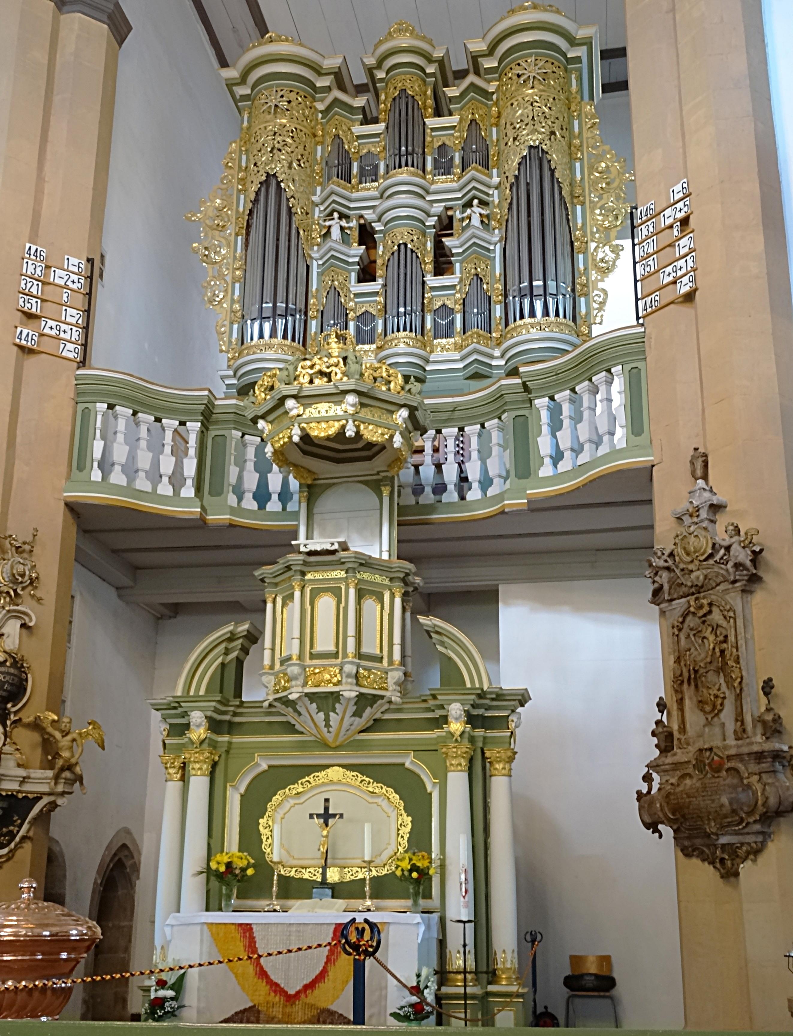 Chor in St. Johannis (Schleusingen)